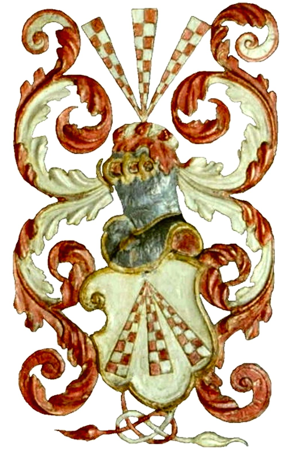 Wappen des Rittergeschlechtes der Scharpenberg. In der St.-Sylvester-Kirche in Quakenbrück aus dem 13. Jahrhundert findet man an Kirchenstühlen und Chor geschnitzte und bemalte Wappen, u.a. das der Familie von Scharpenberg. Ein Hauptmerkmal des Scharfenberg-Wappens ist die geschachte Lanzenspitze (der 'Strahl' ), die angeblich mit der heiligen Lanze zu tun haben soll. Aus dem Foto des geschnitzten Wappens aus Quakenbrück habe ich das Kirchengestühl wegretuschiert und so ein digital verwertbares Wappen geschaffen.